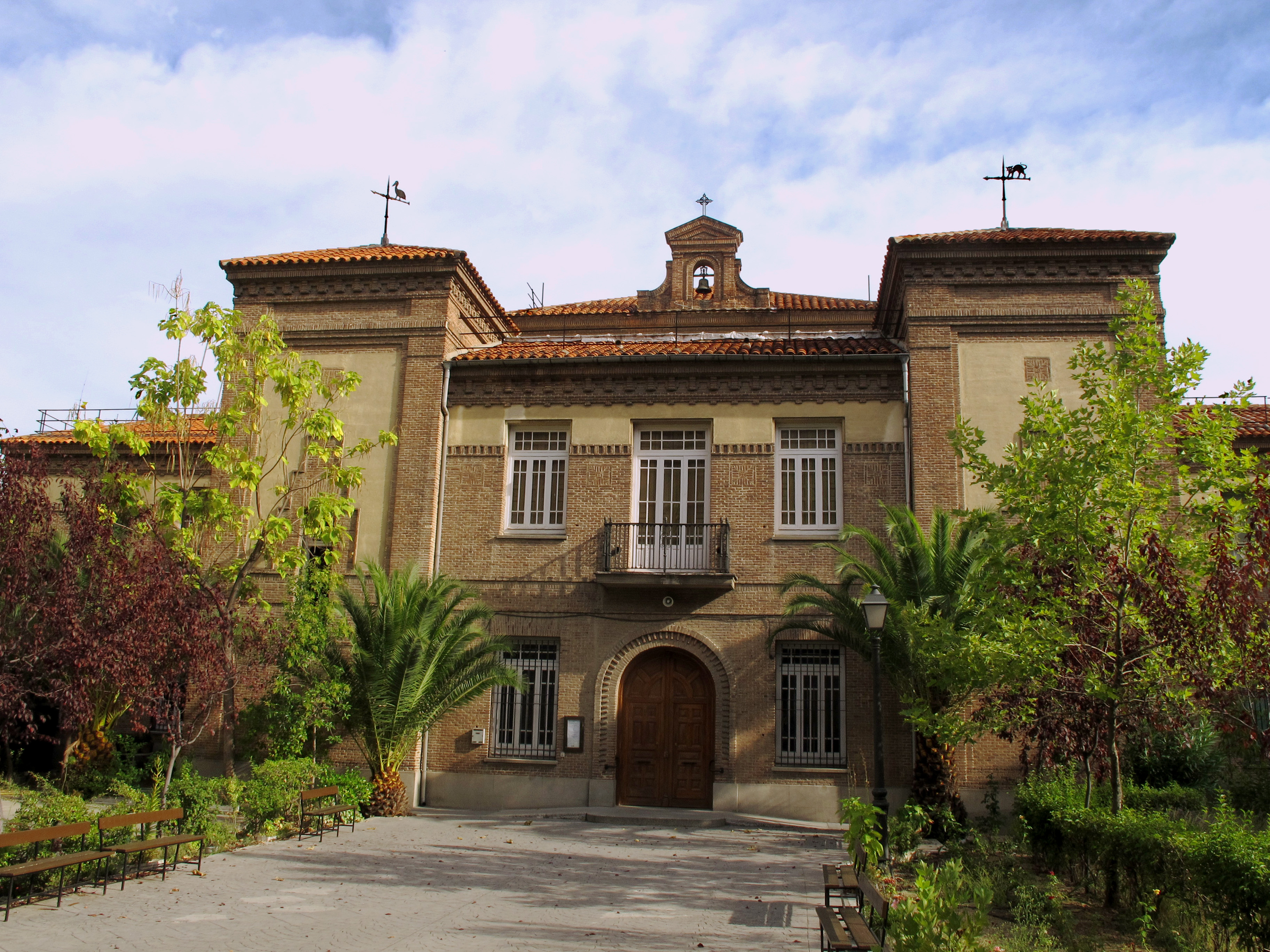 Religiosos de la Iglesia y Colegio de Santa Matilde, calle López de Hoyos, barrio de Prosperidad, distrito de Chamartin, Madrid.